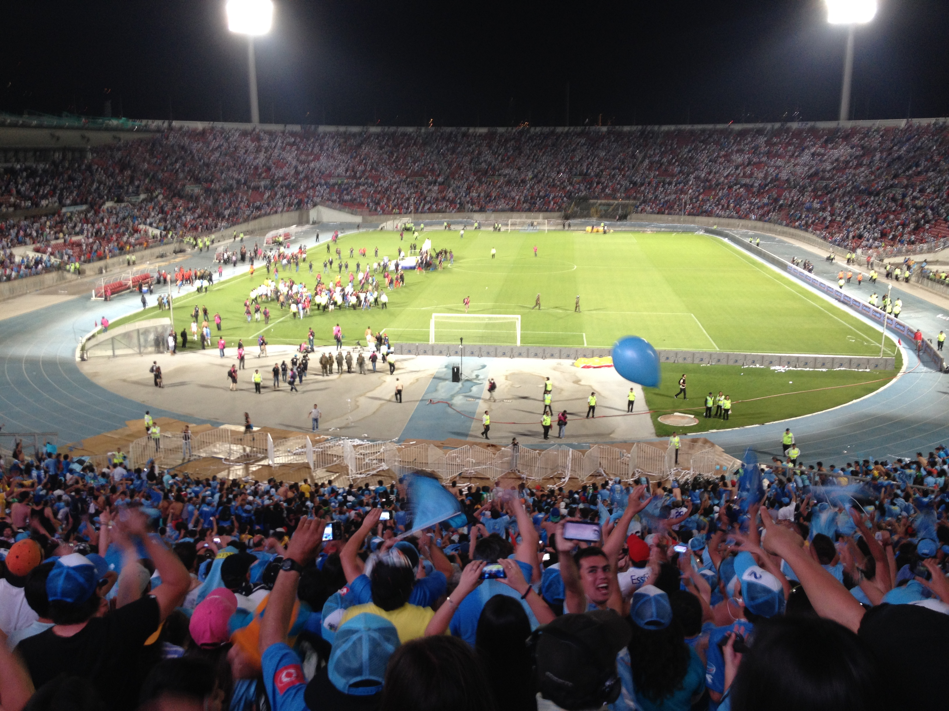 Club Deportivo O'Higgins campeón Apertura 2013.